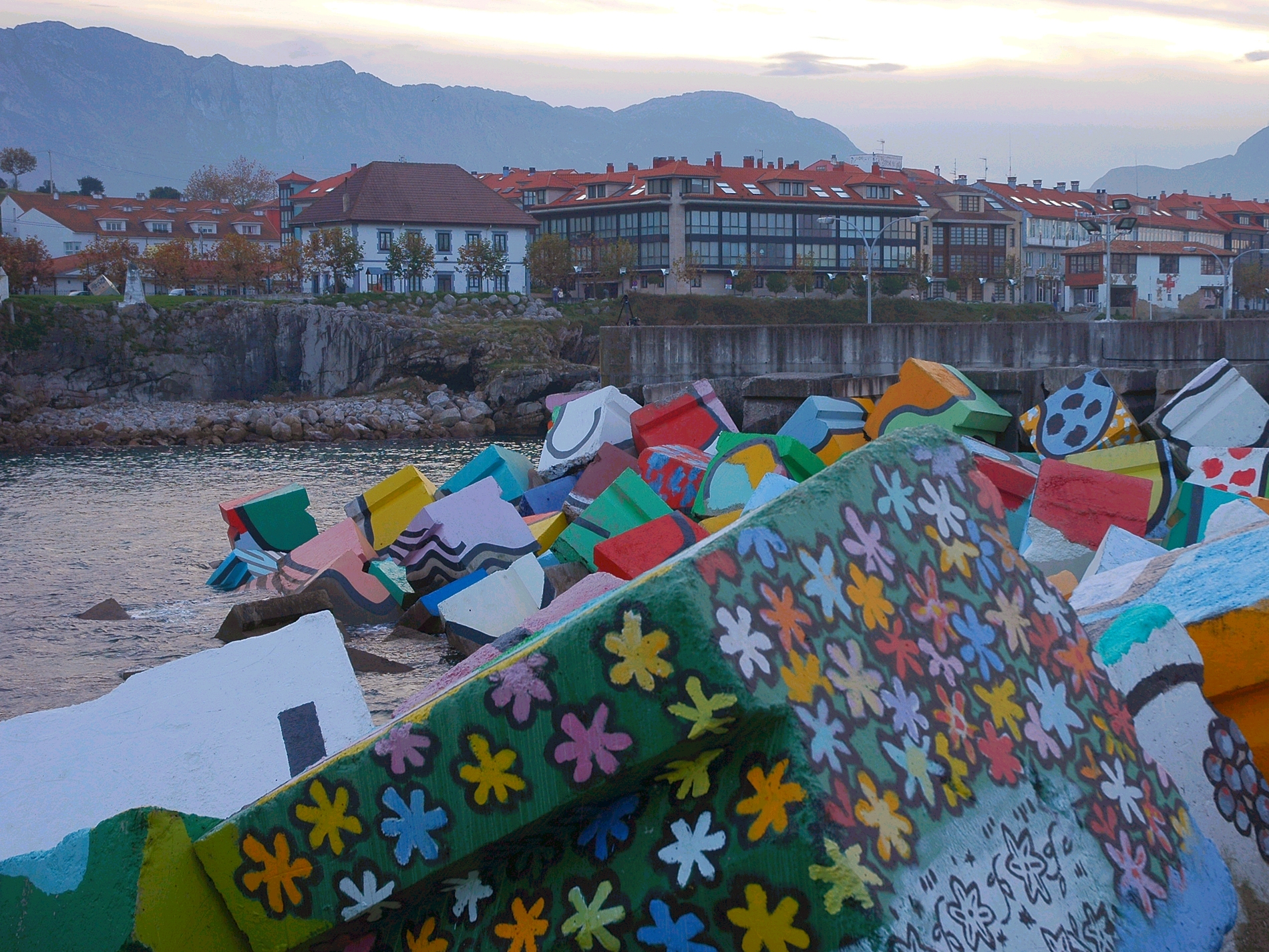 Puerto de Llanes. "Los cubos de la Memoria", de Agustín Ibarrola. Autor: Ramón Noriega